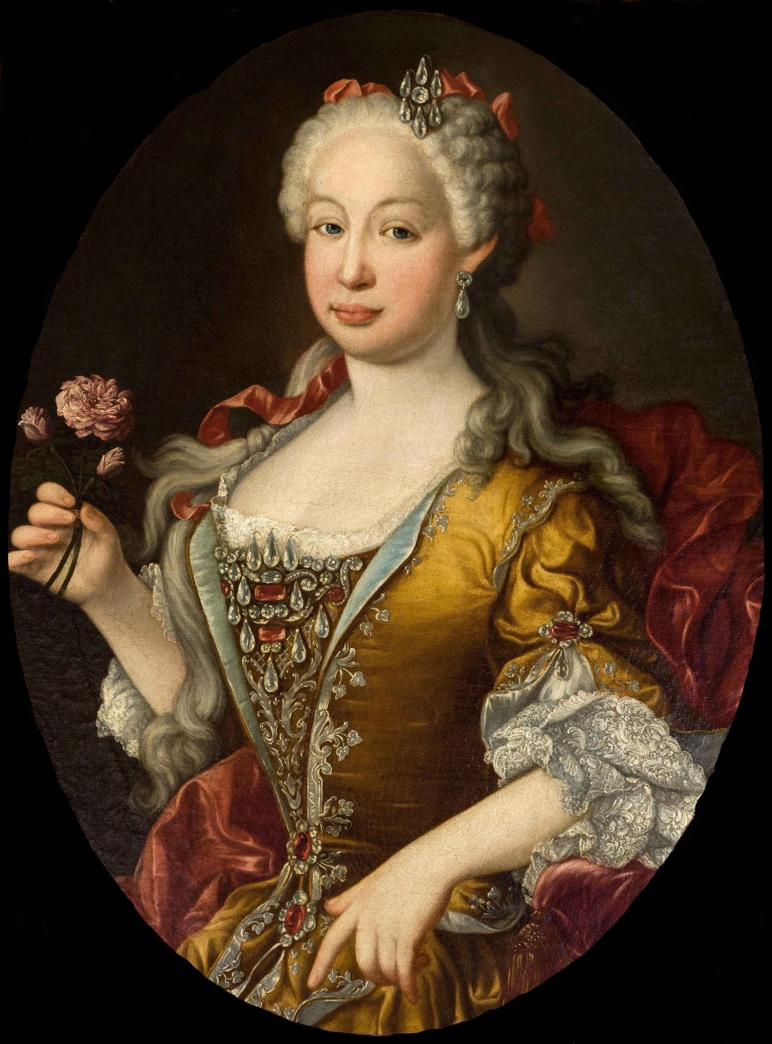 Retrato de la reina Bárbara de Braganza (1711-1758), que fue reina consorte de España por su matrimonio con Fernando VI de España.